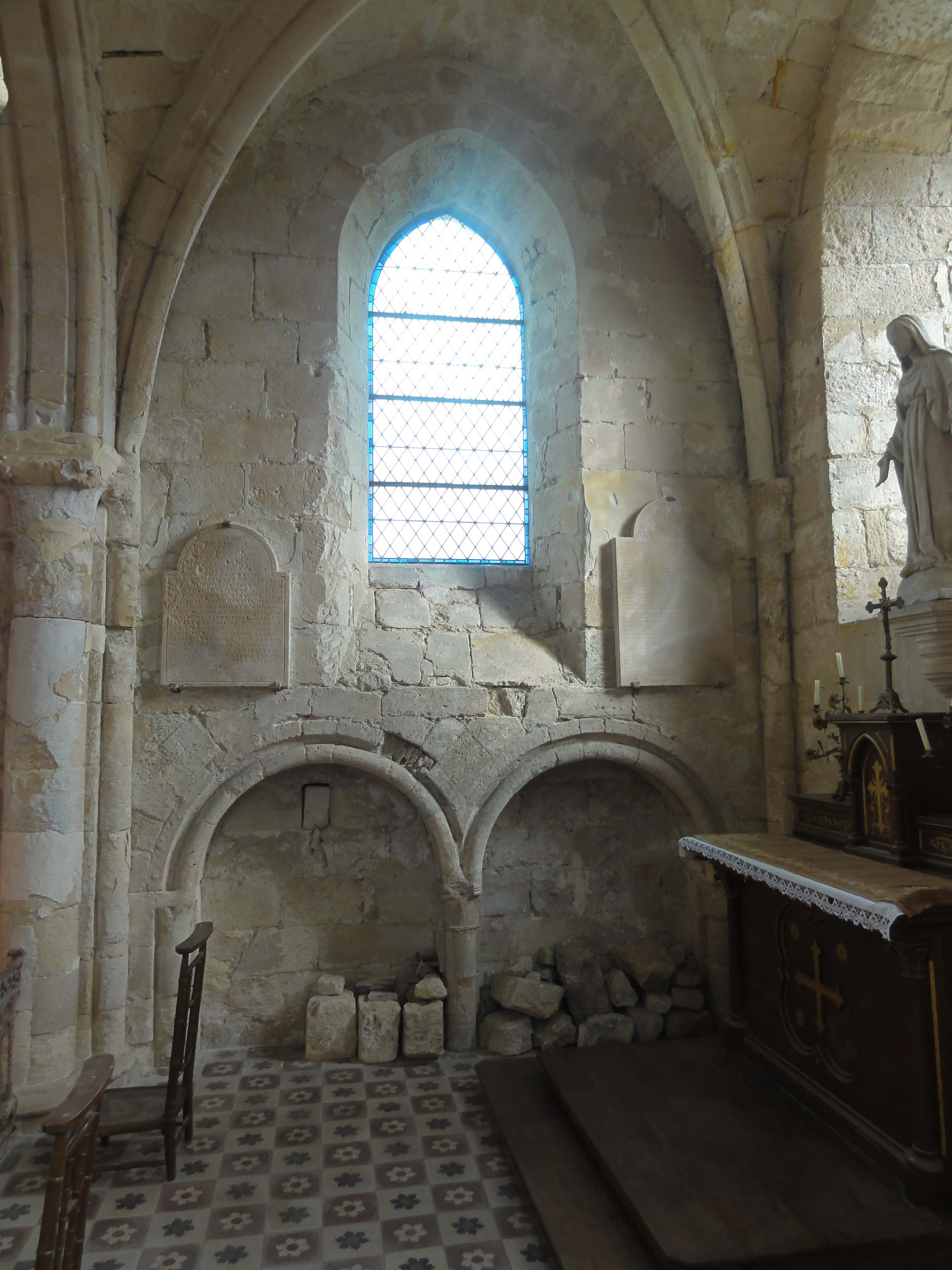 Intérieur de l'église - voir titre.